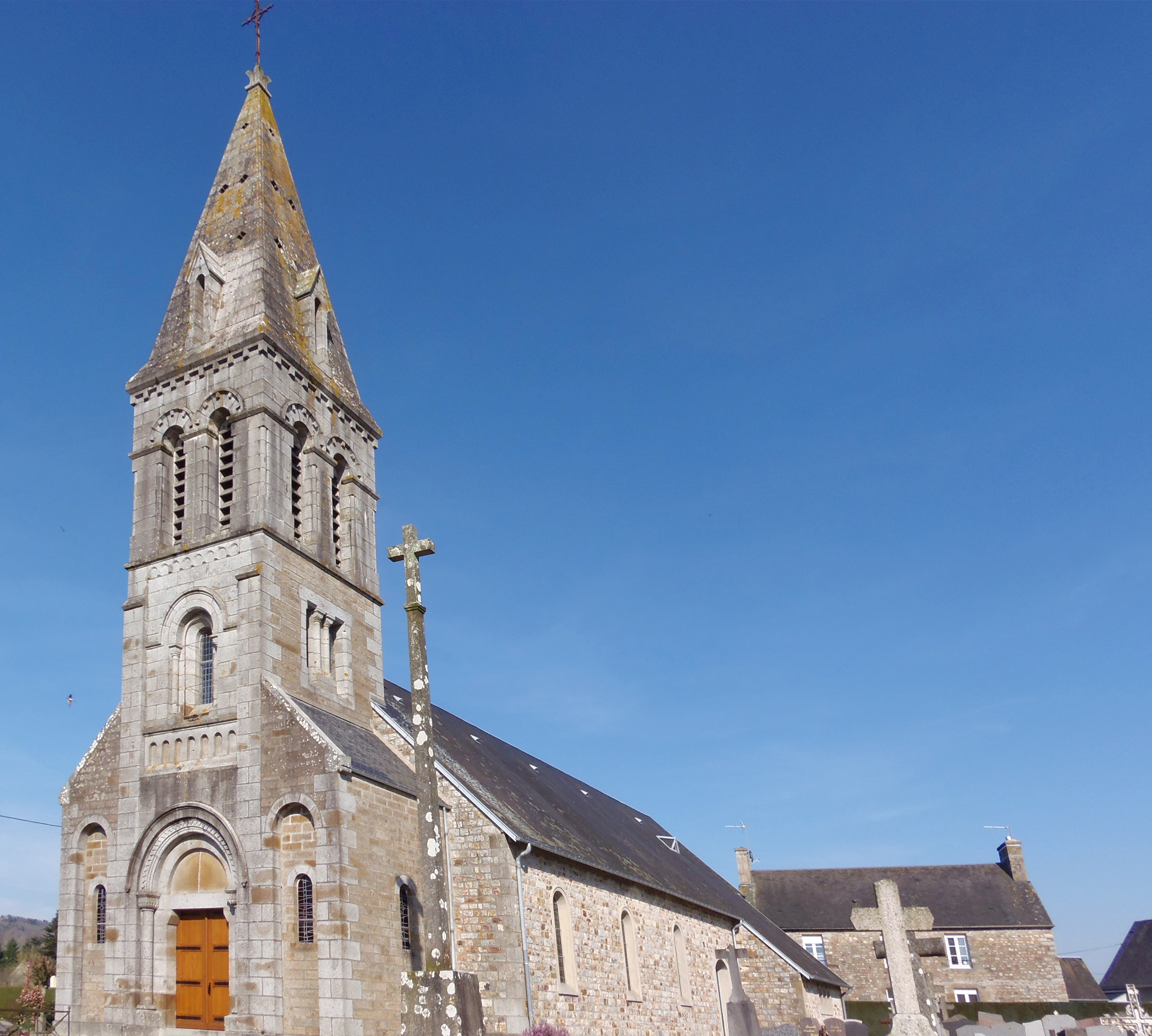 Bion (Normandie, France). L'église Saint-Pierre.